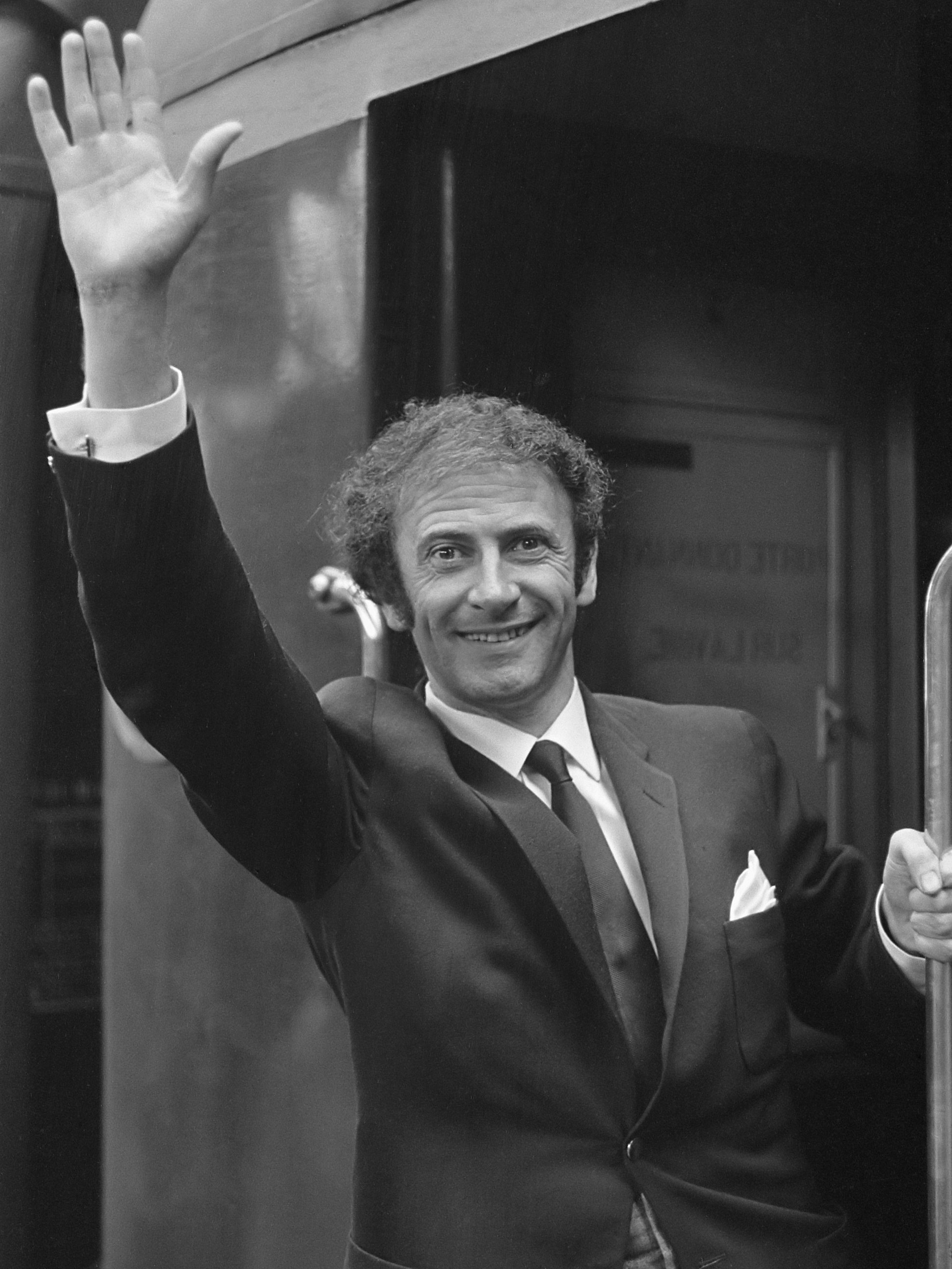 Marcel Marceau op Centraal Station voor optreden in Nederland 29 juni 1962